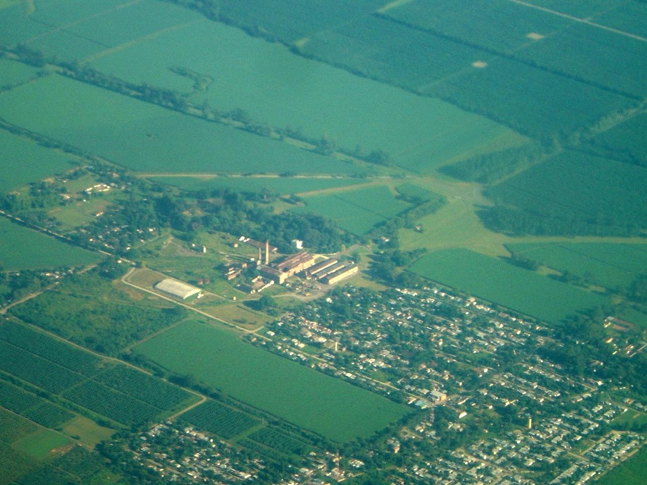 Old sugar mill in San Pablo, Lules, Tucumán Province.